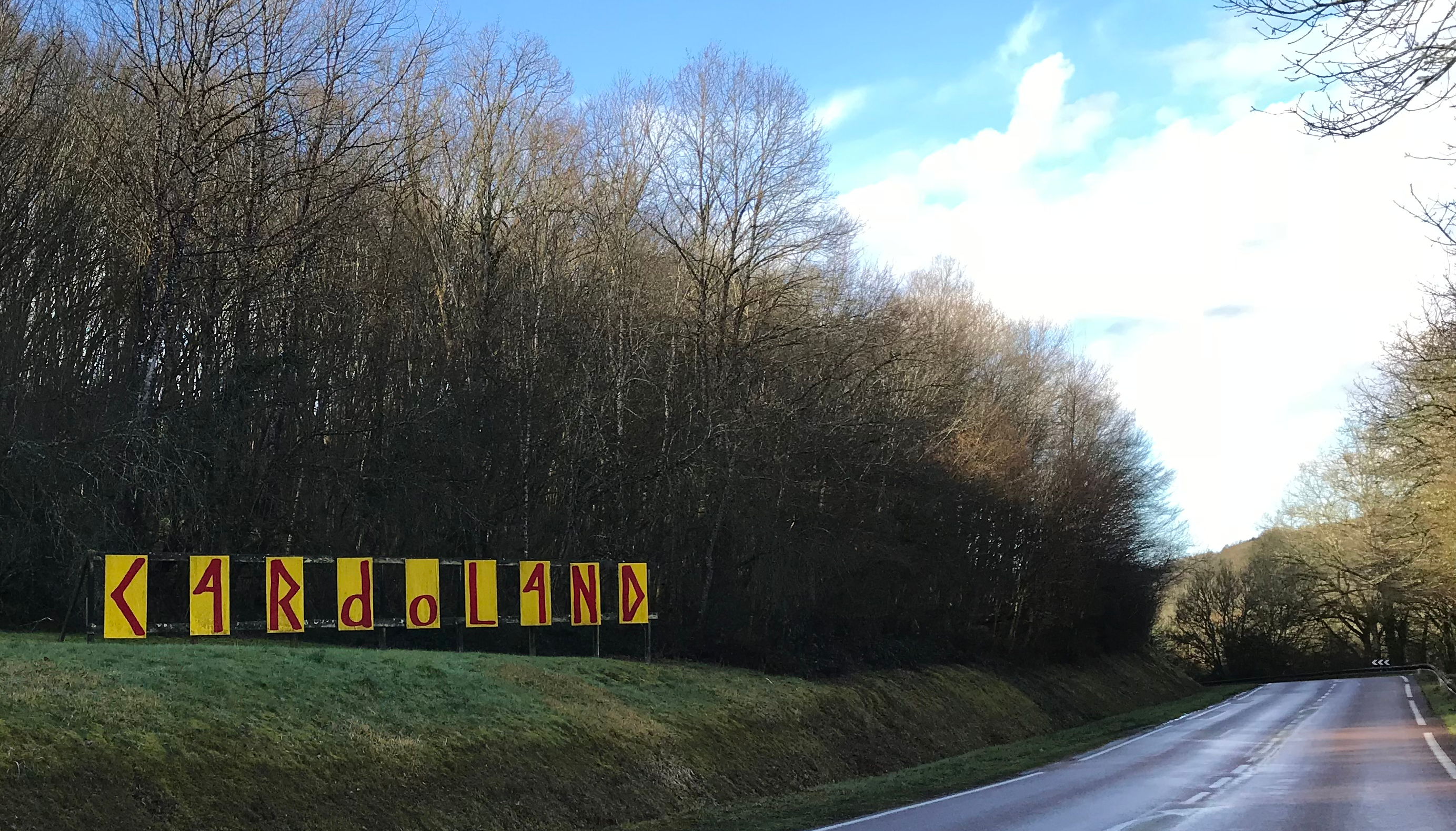 Panneau du parc annonçant Cardoland à Chamoux (Yonne, France) en 2018.